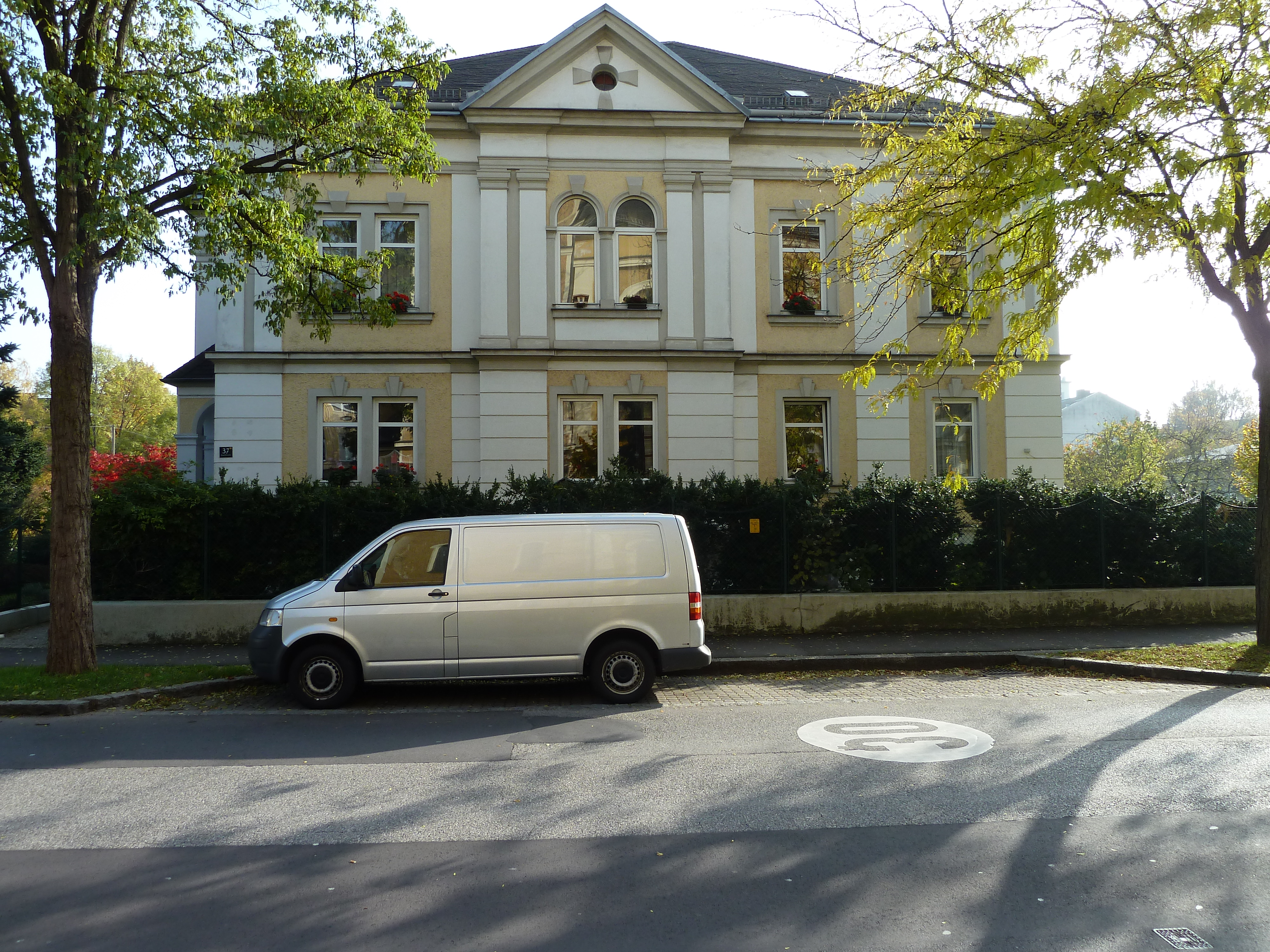 Pfarrhof hl. Josef und hl. Quirinus, Pfarramt Kleinmünchen